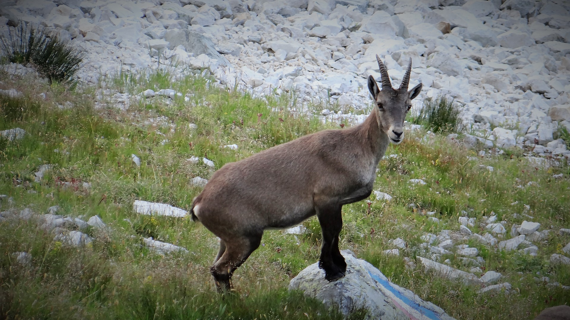 Etagne près du chalet des gardes (2431 m) au dessus du Lac des Vaches en Vanoise